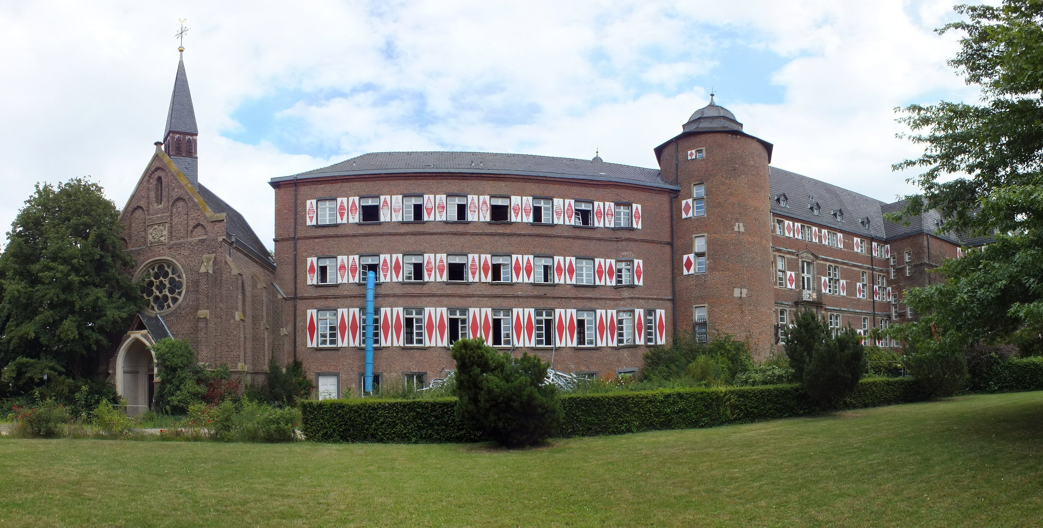 Rheinische Ritterakademie (Mitte) und Schlosskapelle (links) 2011 kurz vor dem Abriss. Rechts der Turm gehört schon zum Schloss Bedburg.